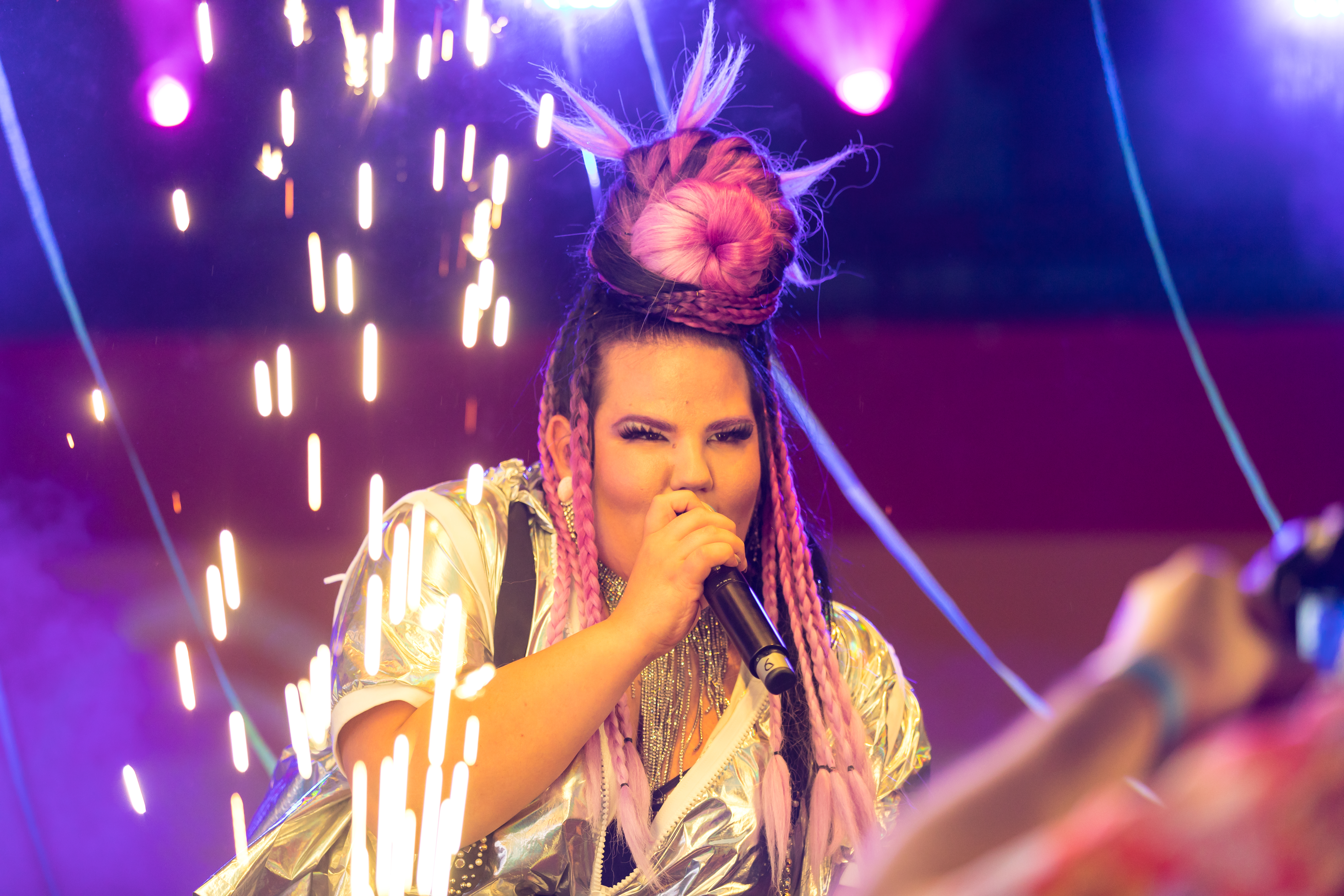 ColognePride/CSD 2018 - Auftritt von Netta Barzilai auf der Hauptbühne, Heumarkt